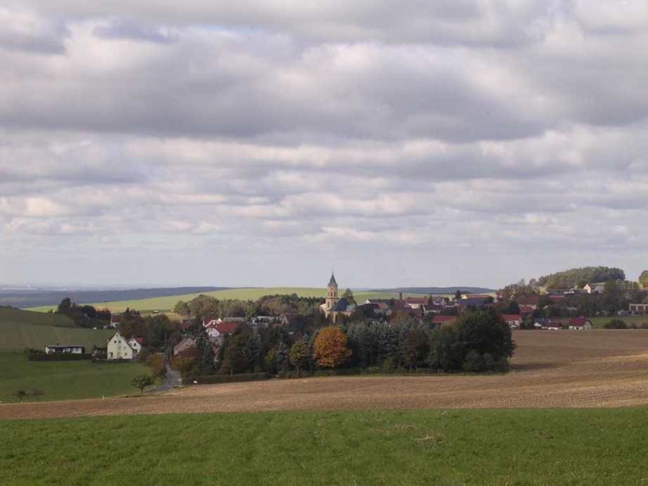 Lichtenberg (Sachsen), Blick vom Eierberg bei Pulsnitz